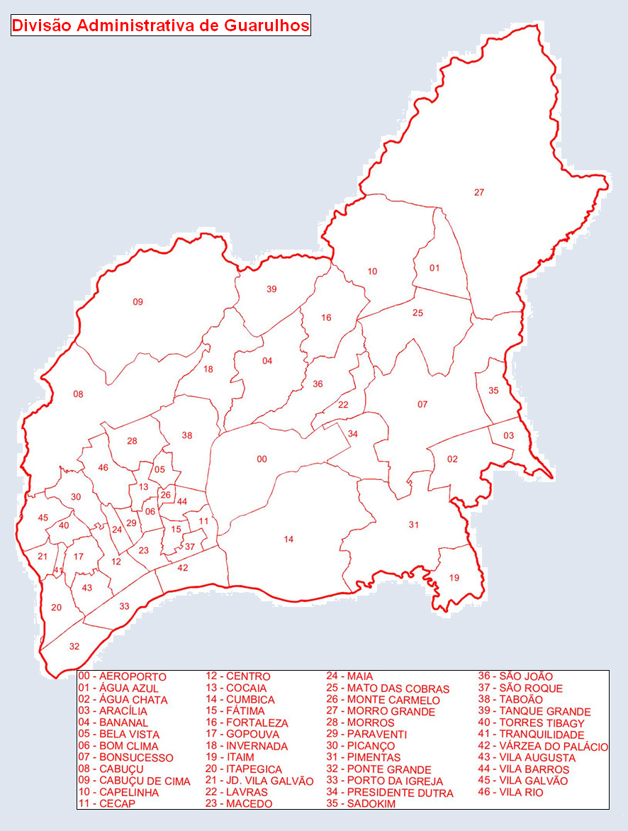 Divisão Administrativa de Guarulhos